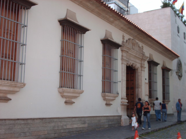 Fachada Museo Bolivariano - Caracas